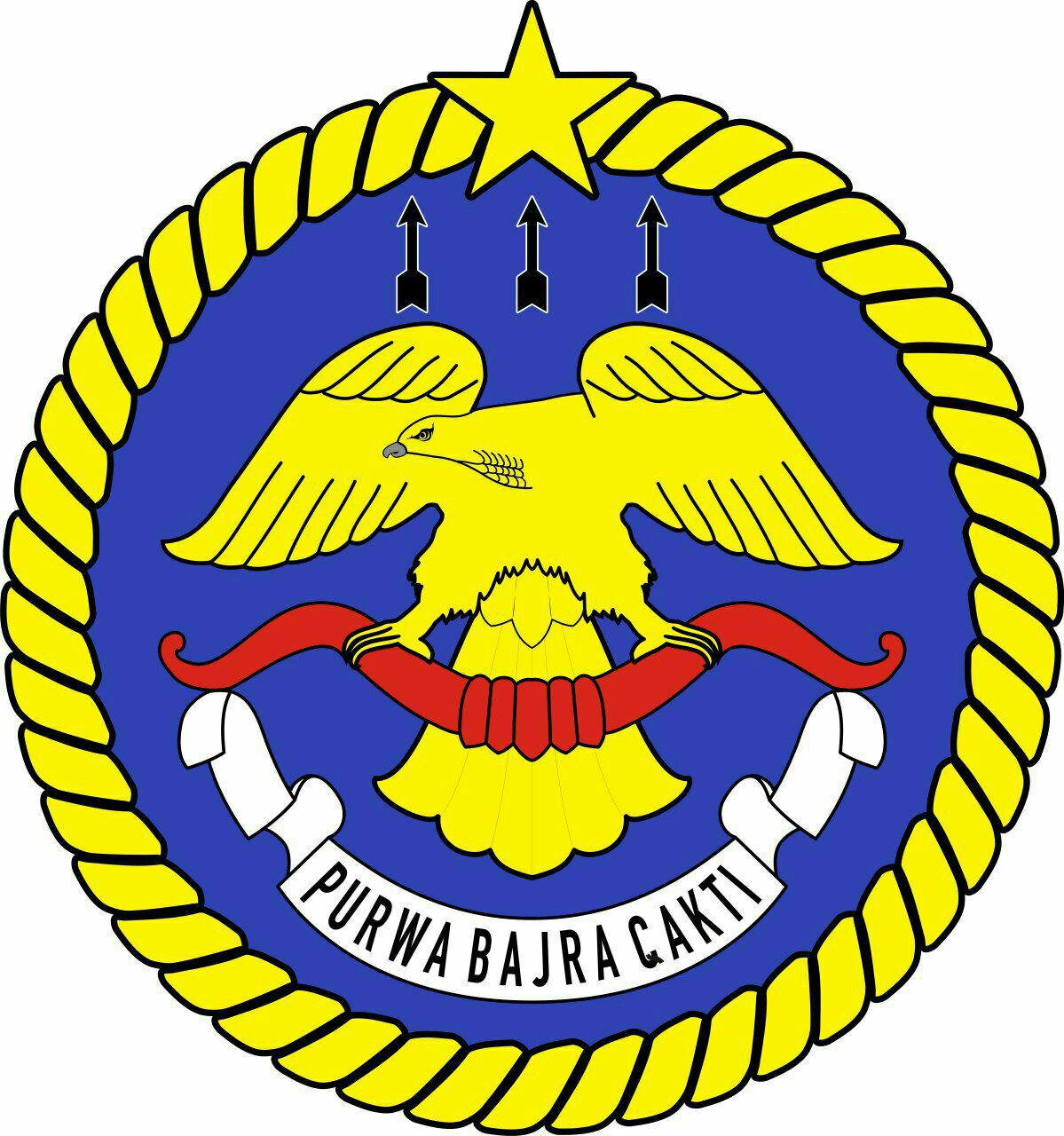 Lambang Terbaru Batalyon Arhanud 1/1 Kostrad